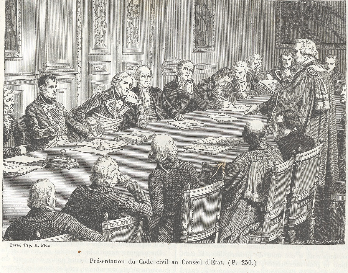 Présentation du Code civil au Conseil d’État. Extrait de l’Histoire du Consulat par Adolphe Thiers